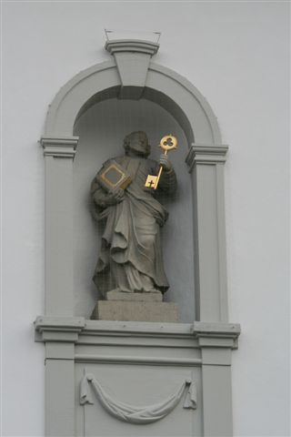 De Aposchtl Petrus an de Chile-Fassade vo de römisch-katholische Chile vo Boiel, Schwiiz